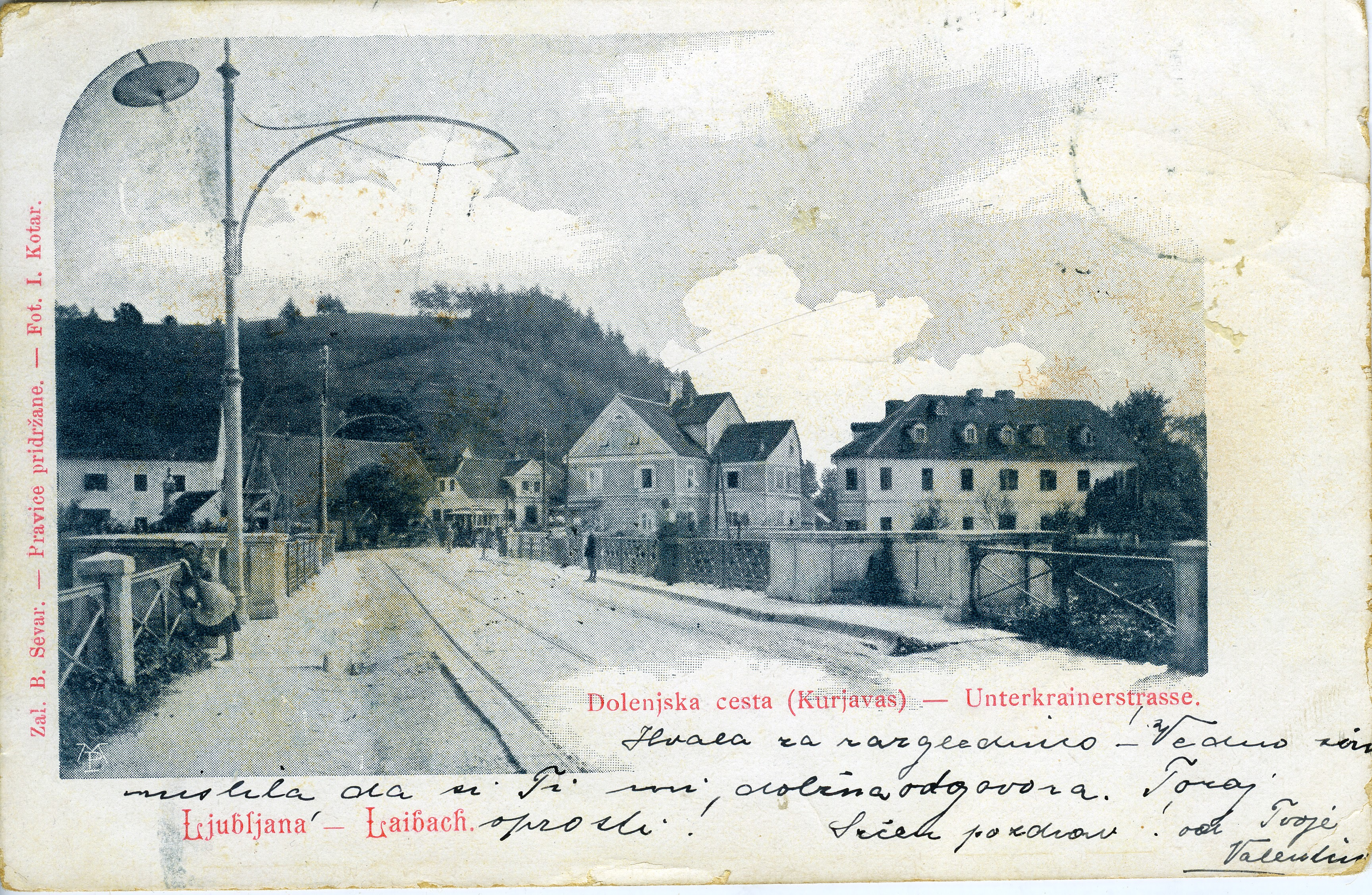 Razglednica Dolenjske ceste v Ljubljani.